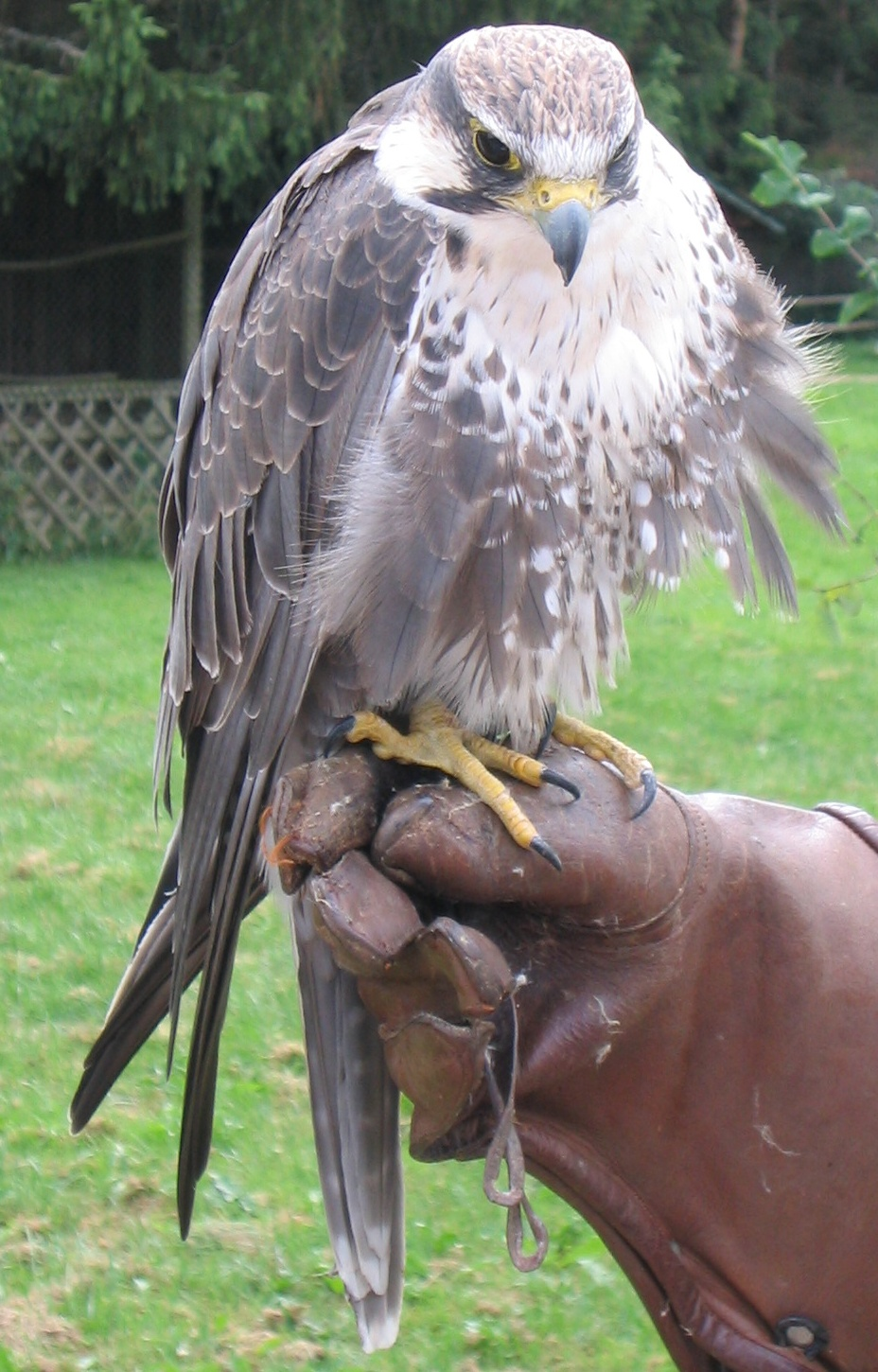 Falco Jugger Laggar falcon (Bangla:)